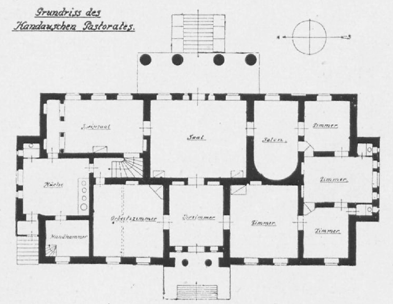 Kandavas mācītājmuižas jeb pastorāta plāns